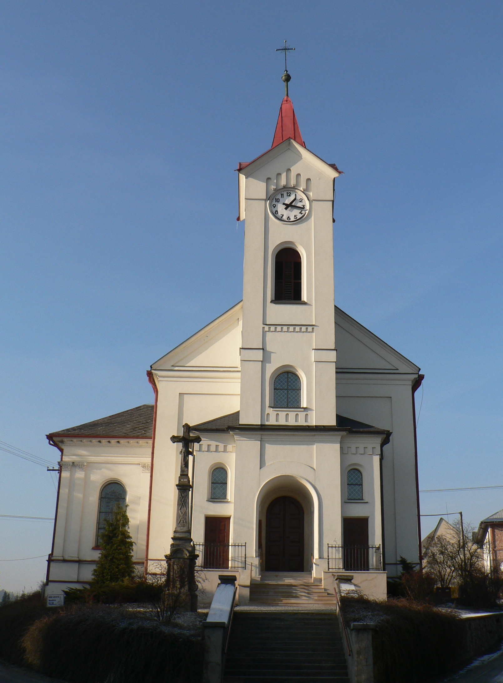 Kostel Nanebevzetí Panny Marie (Svébohov)